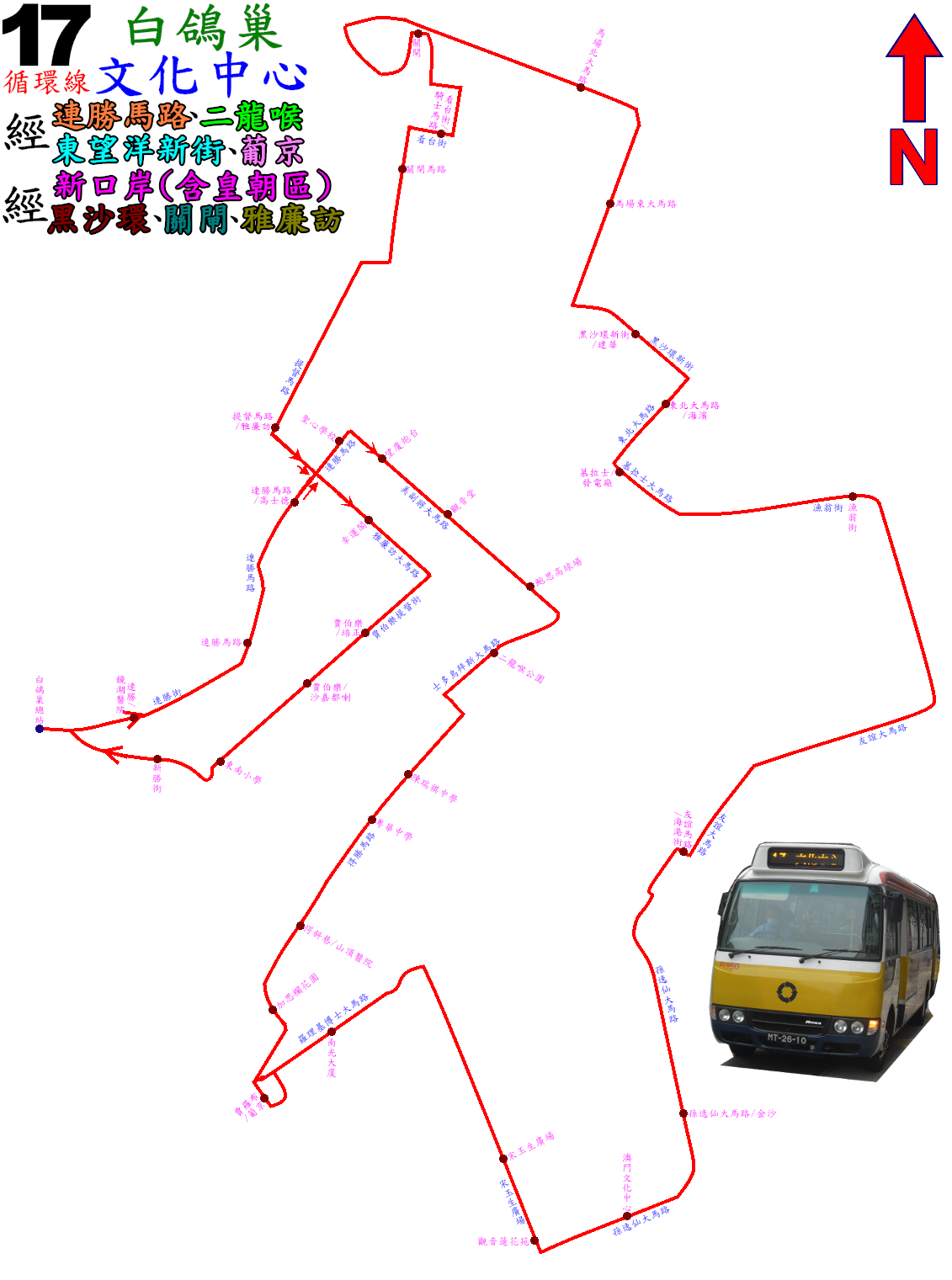 中文（香港）: 澳門巴士17線的走線圖